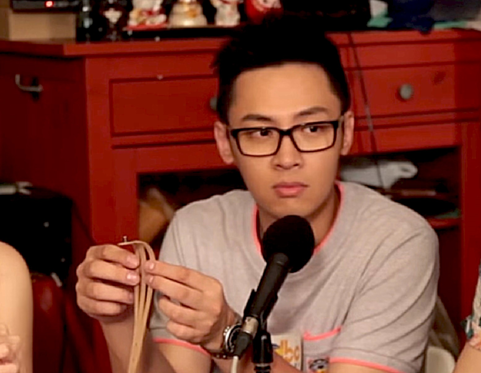 中文（香港）: 香港男演員，曾在無綫電視處境劇《愛·回家》裡，飾演「李志成（醒哥）」一角而走紅